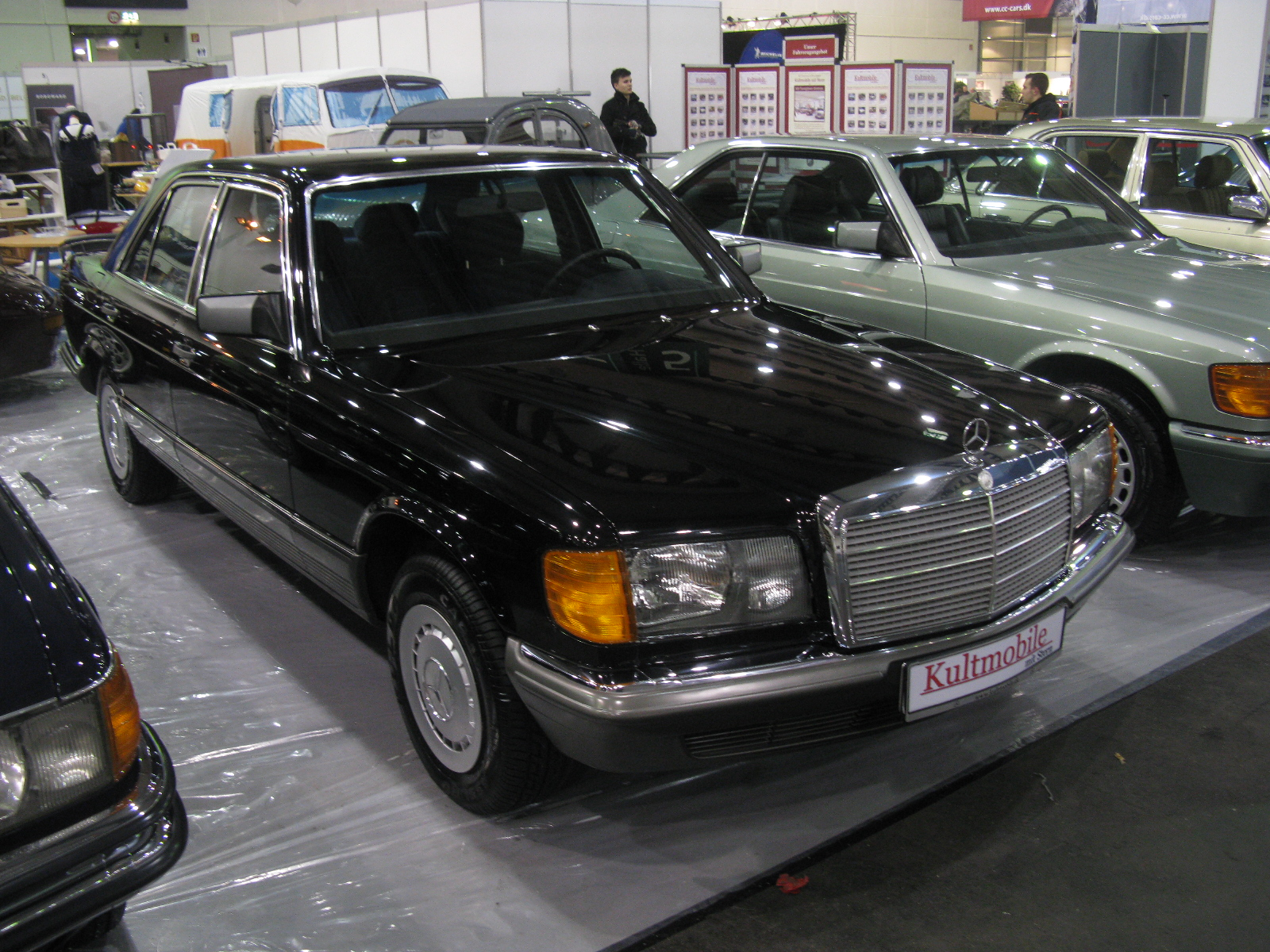 Mercedes-Benz 280 S W126